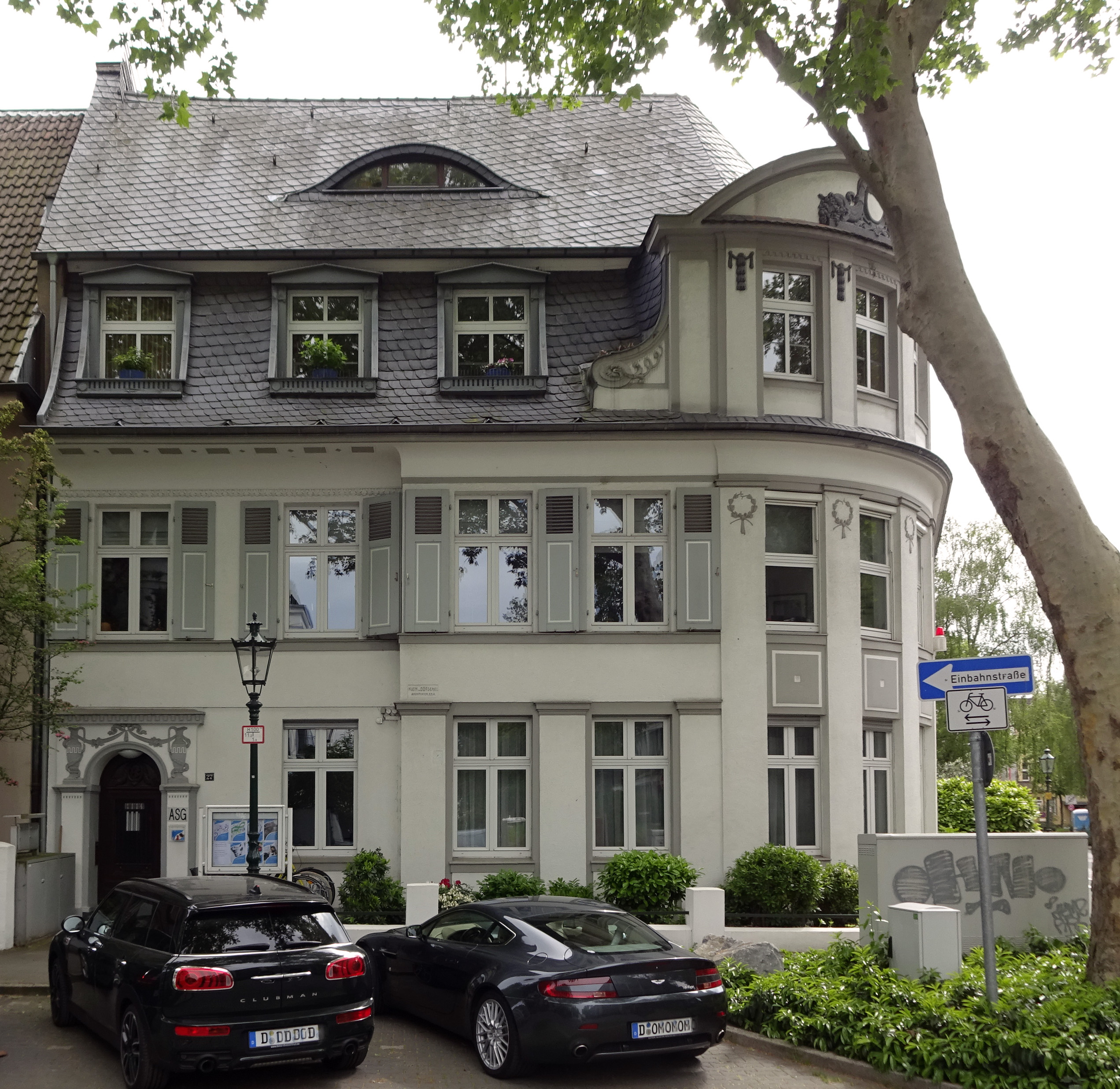 Haus Wildenbruchstraße 27, Düsseldorf-Oberkassel